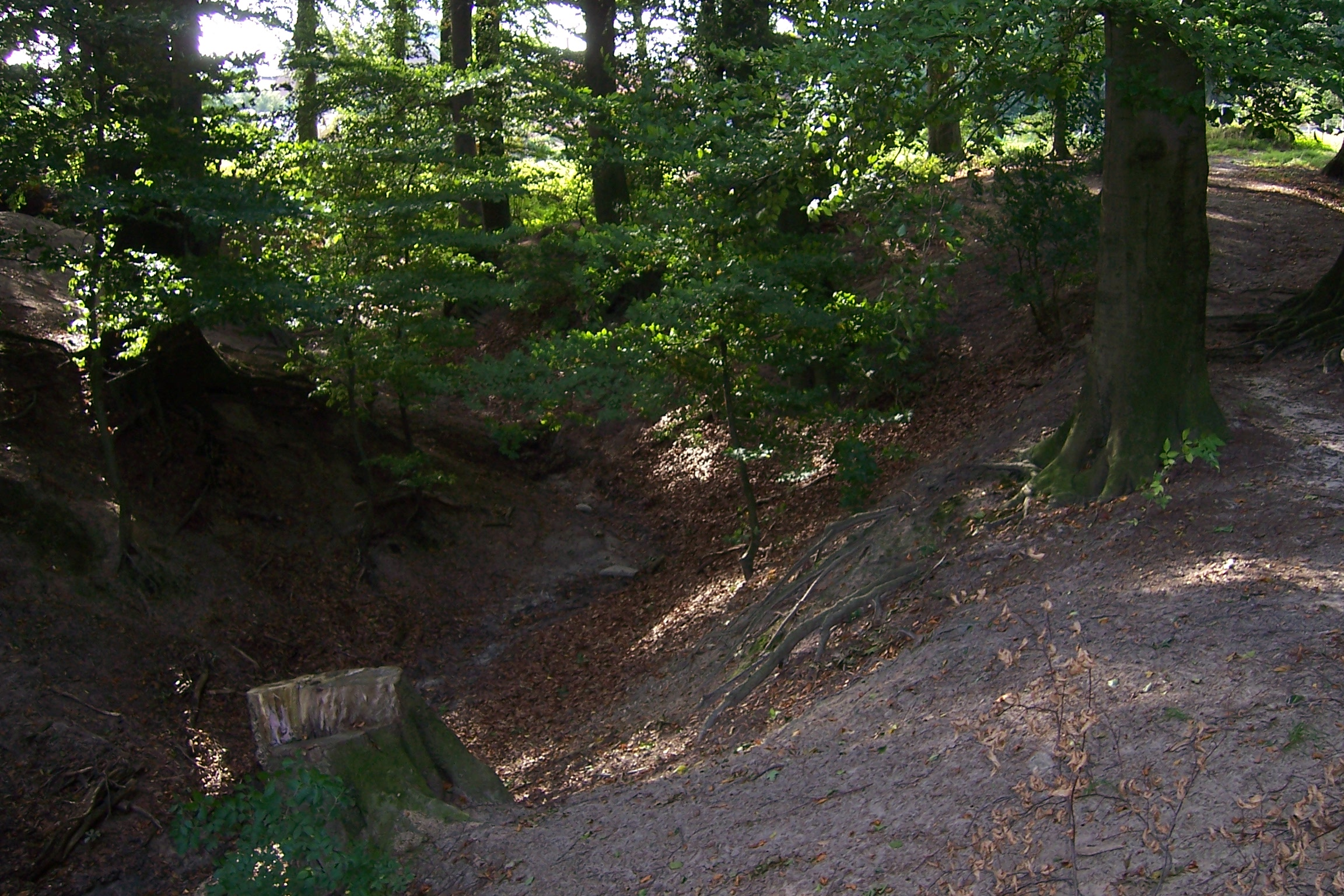 Die Sitter, Trockentäler der Eiszeit am Coesfelder Berg, Coesfeld, NRW, Germany.